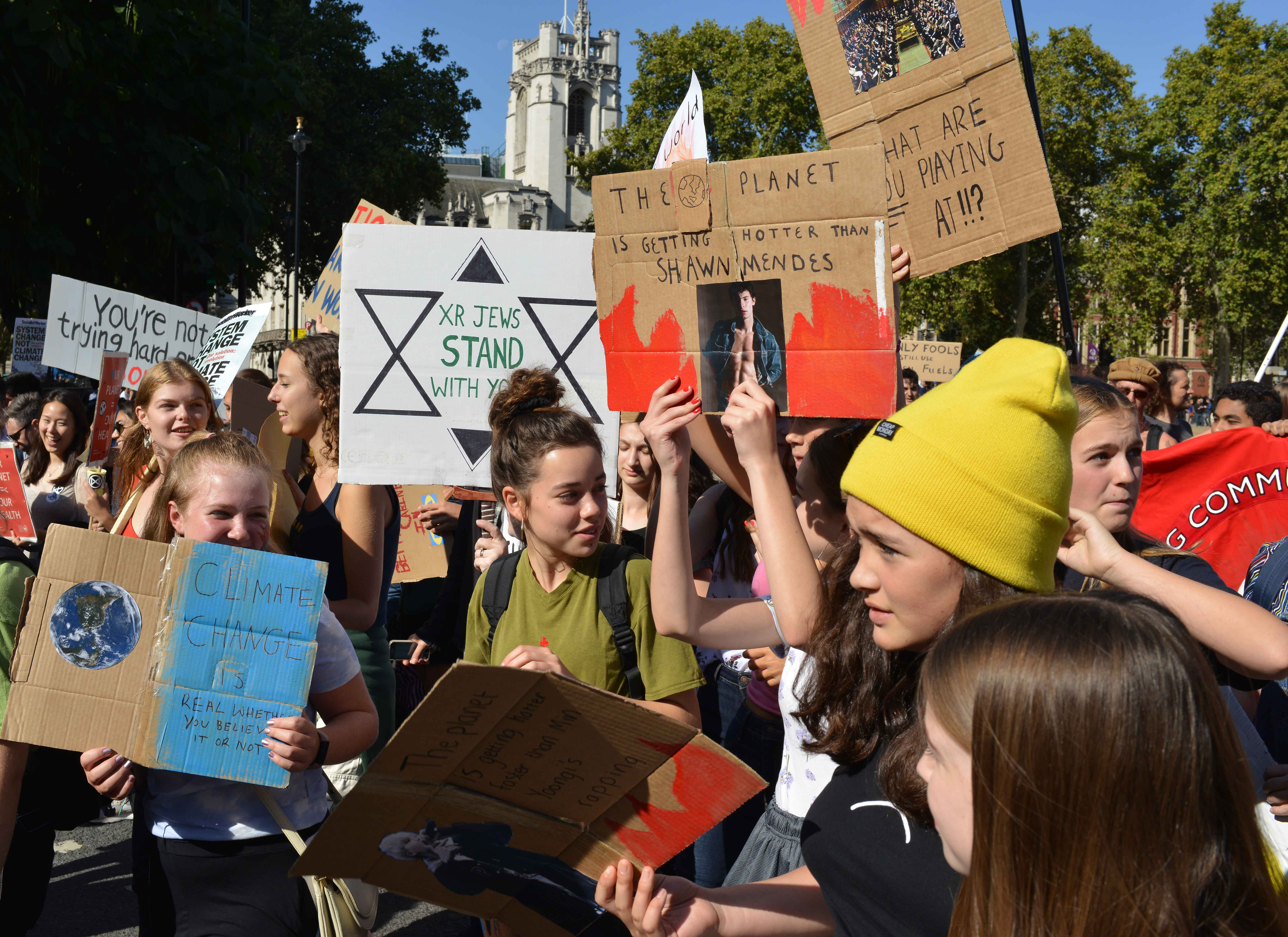 Climate Strike protest, Westminster, London, 20 September 2019